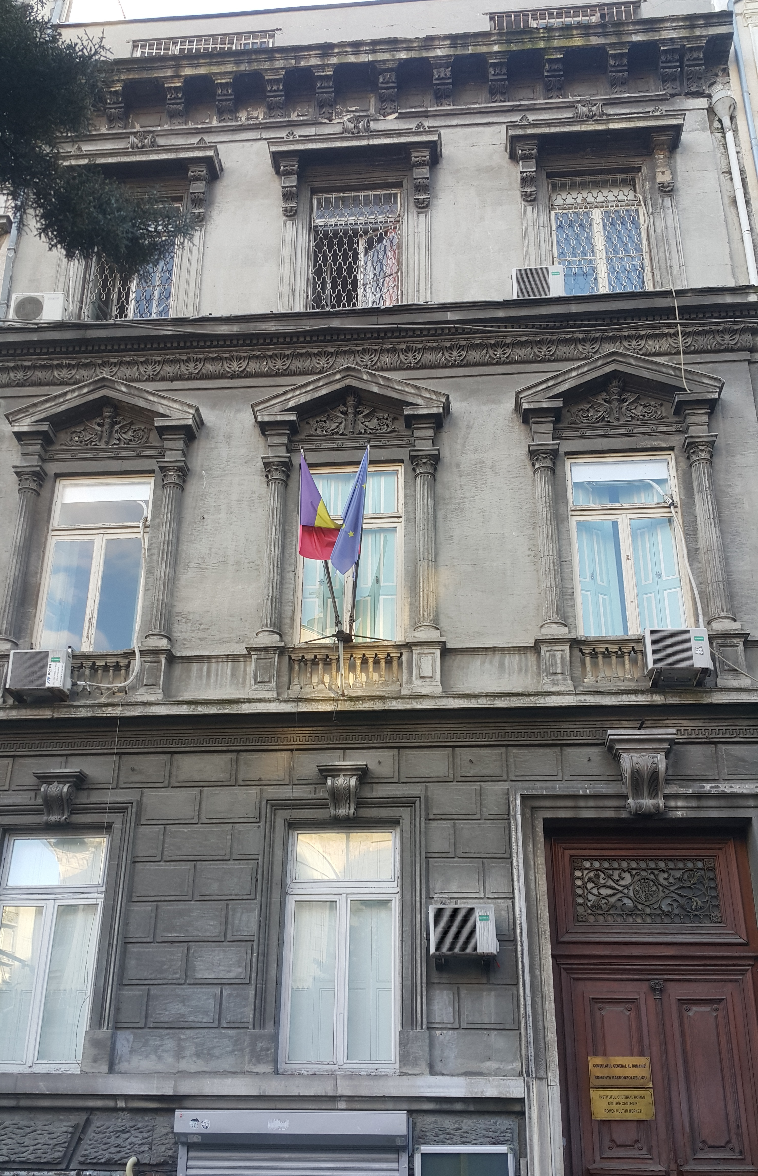 Romanya'nın İstanbul Başkonsolosluğu, Taksim, Türkiye.